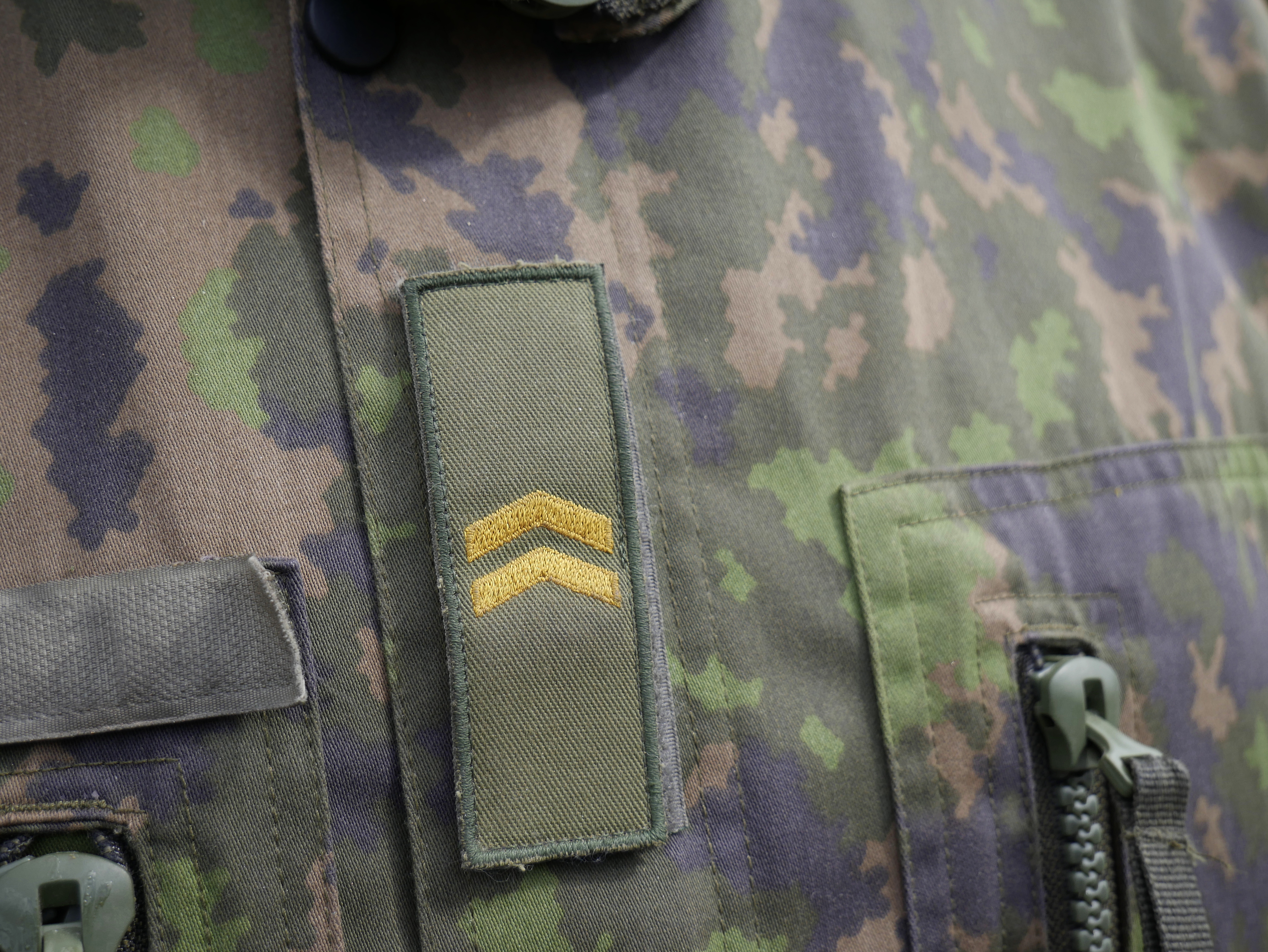 Alikersantin rintalaatta puolustusvoimien maastopuvussa.